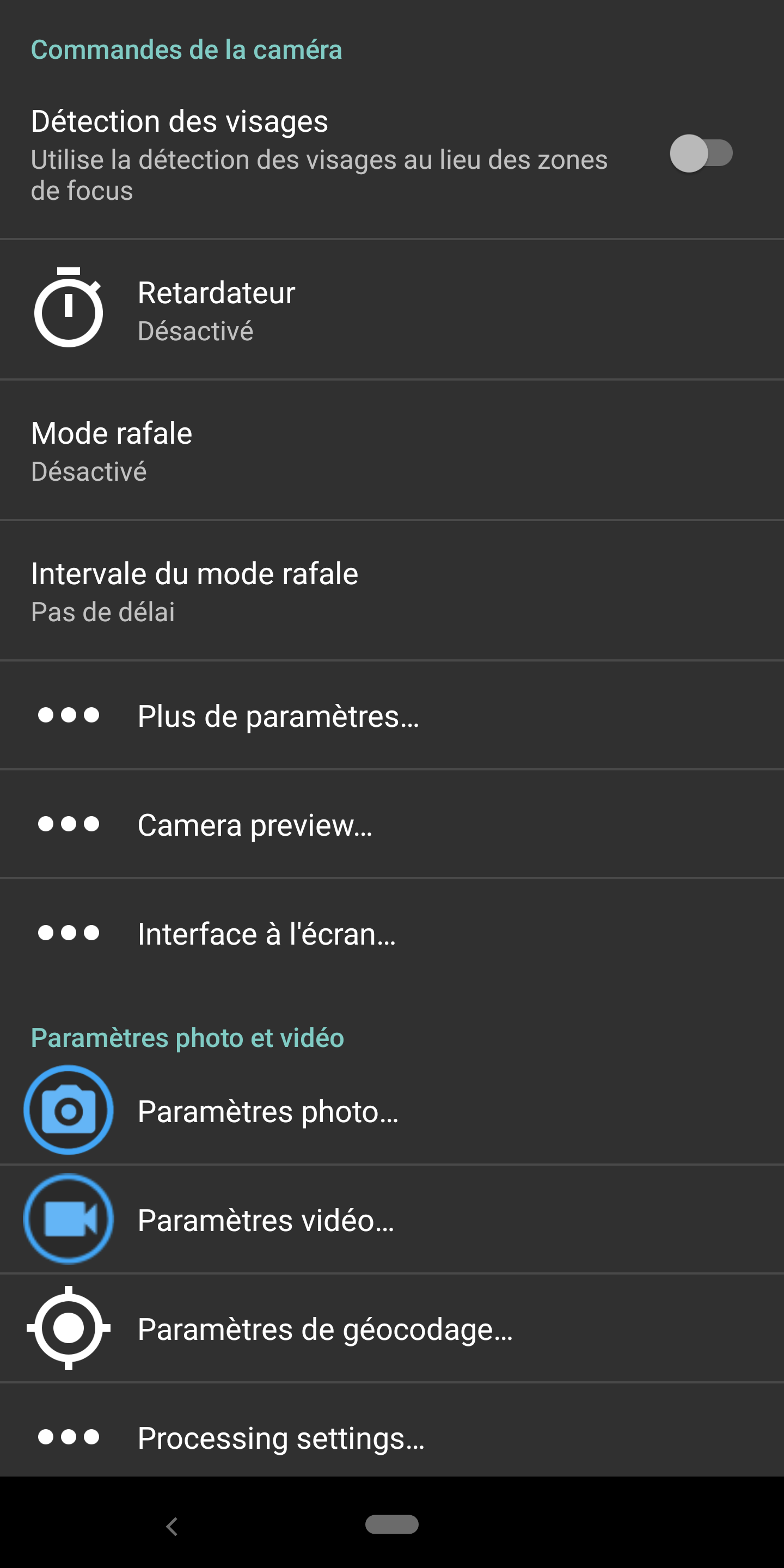 Open Camera est une application gratuite et Open Source photo et vidéo développée par Mark Harman. L'image est liée aux commandes de la caméra de cette application.